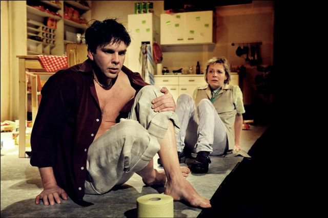 Snímek z inscenace "Zlomatka" autora Maria Gelardiho v režii Petra Mikesky. Na snímku Ivo Theimer a Karolina Frydecká.